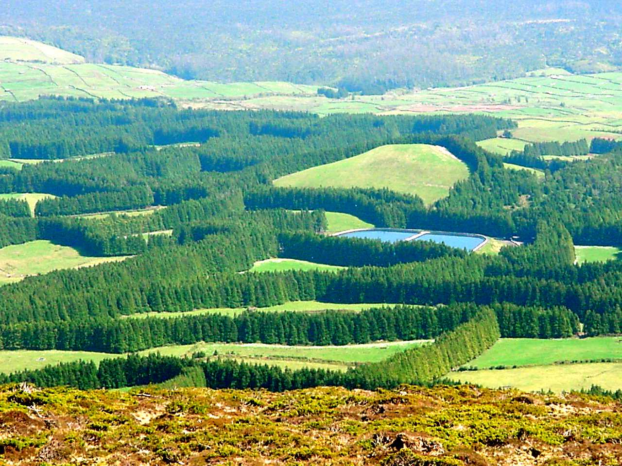 Vista da Serra de Santa Bárbara, ilha Terceira, Açores, Portugal.